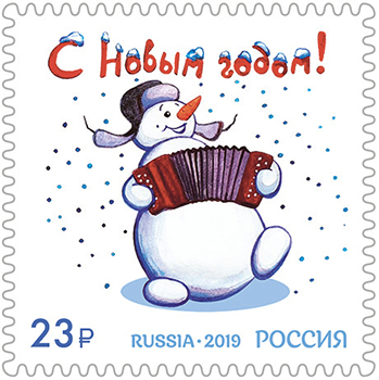 Новогодняя почтовая марка России, выпущенная 5 декабря 2019 года. На марке изображён снеговик, играющий на гармони, на голове у которого шапка-ушанка. Художник — Н. Шомовская. Тираж — 333000 экз. Номер по каталогу ЦФА — 2577.